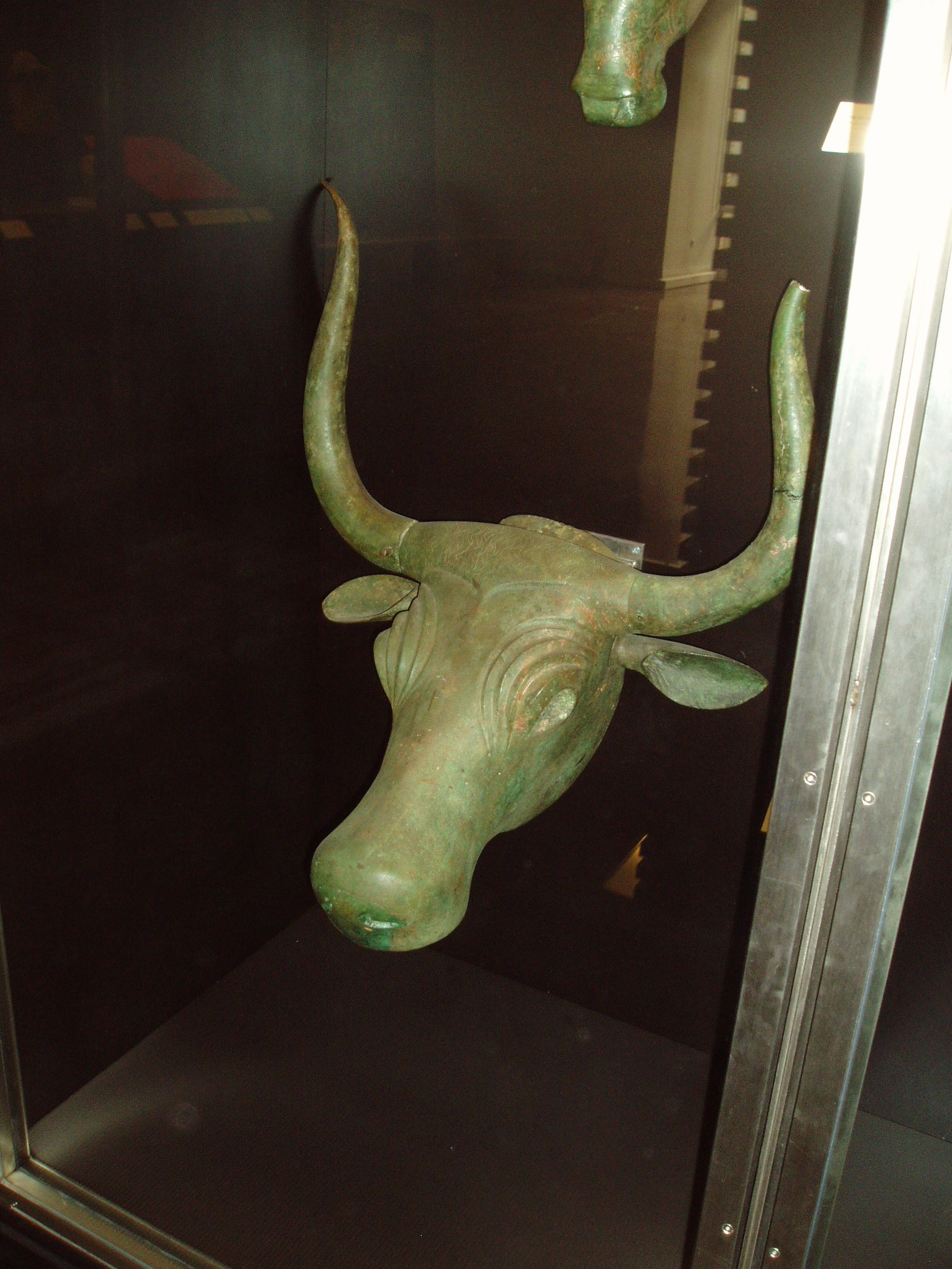 Cabeza de uno de los toros de Costitx en el Museo Arqueológico Nacional (Madrid) de España.